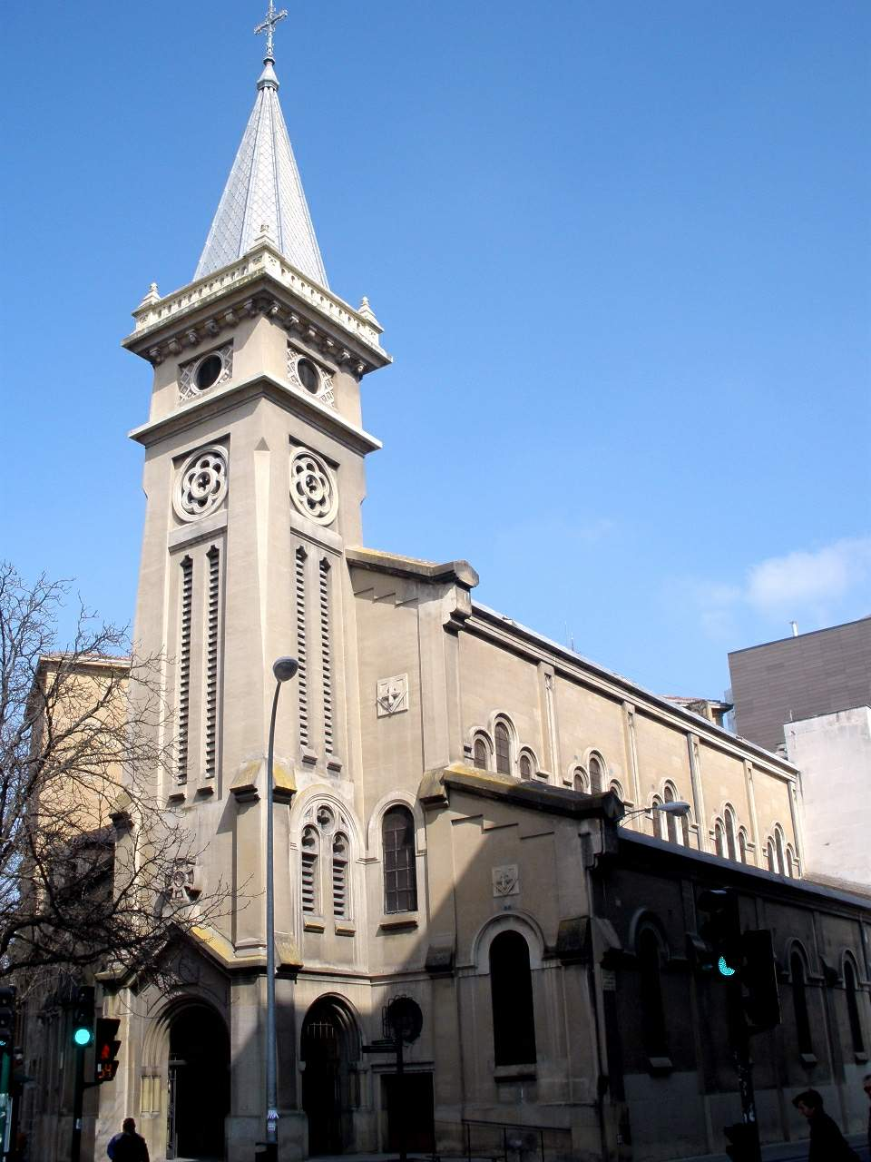 Iglesia de San Ignacio (PP Redentoristas), en Pamplona